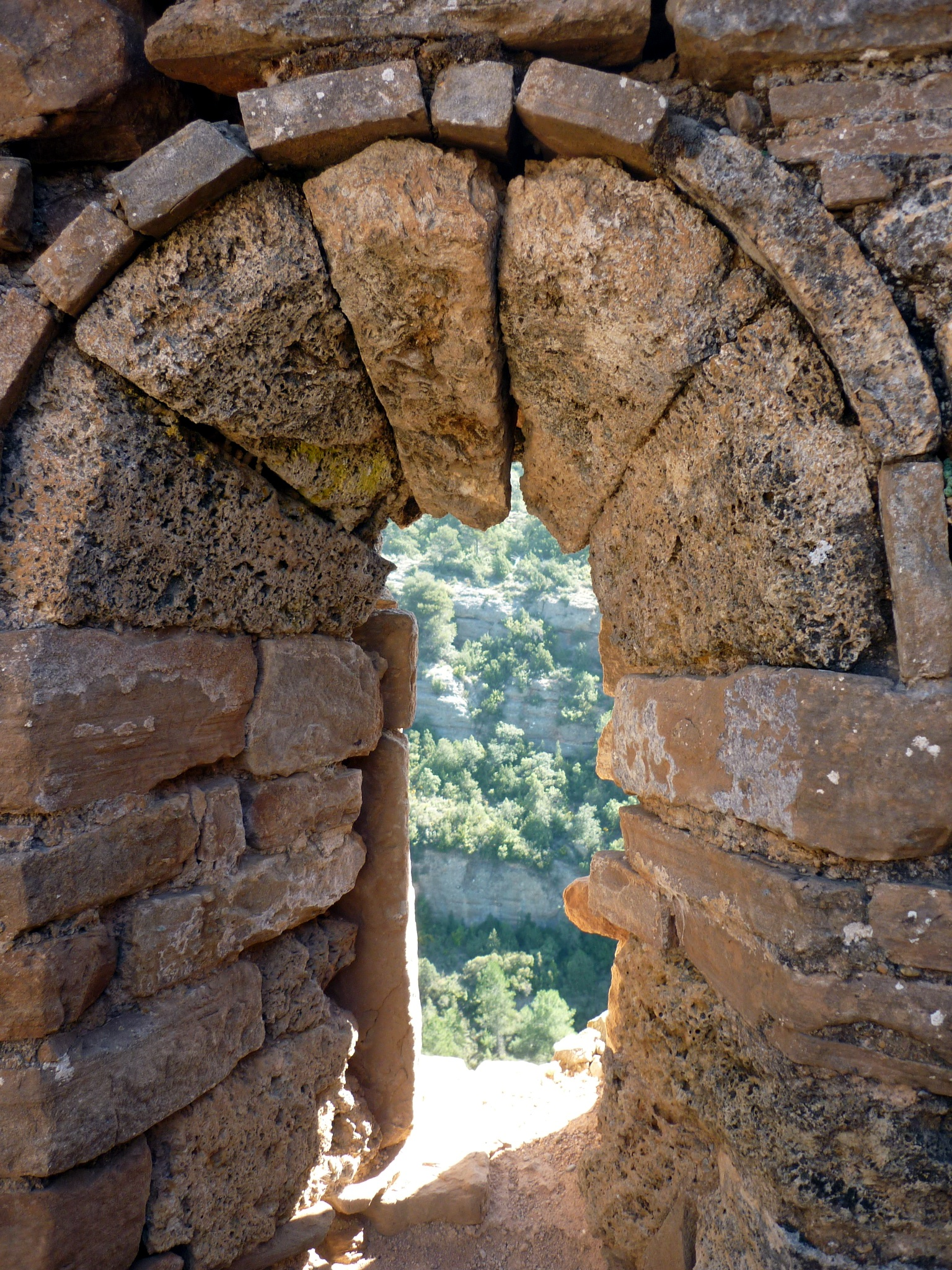 Capella de Sant Esteve de Paracolls (Artesa de Segre): finestra a l'absis